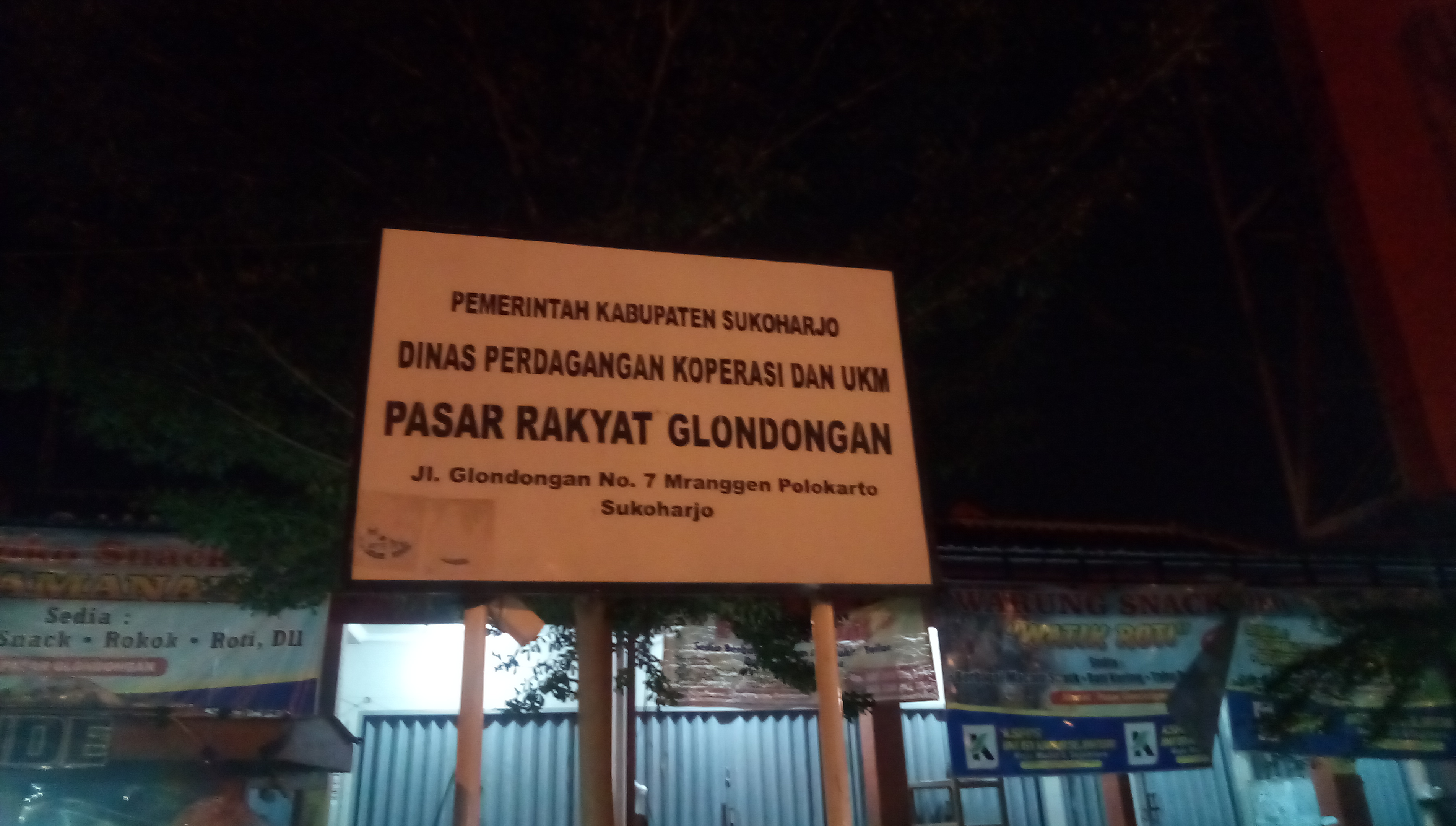 Jawa: Pasar Glondongan kang manggon ing Polokarto.